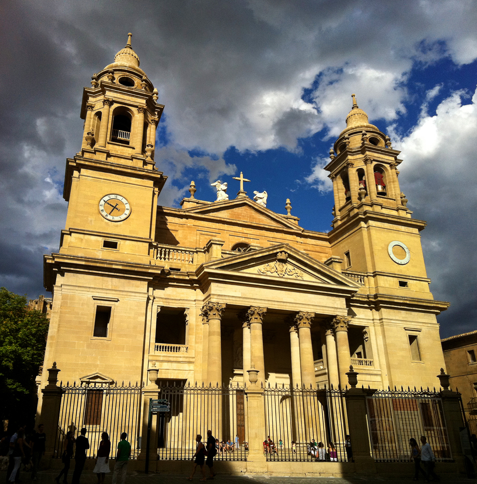 Fachada de la catedral de Pamplona.